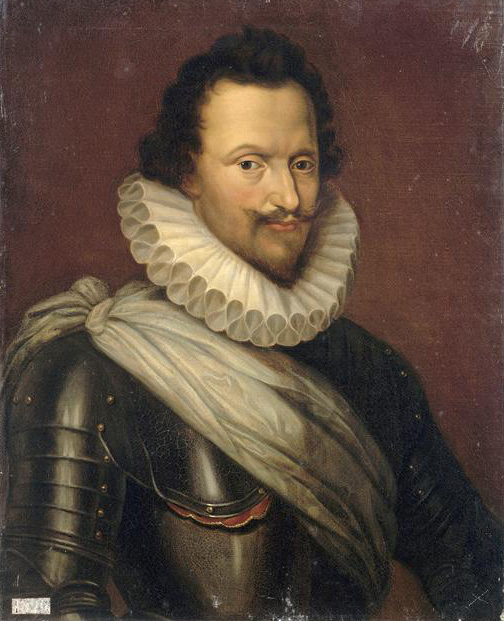 Copie d'après un original conservé au château de Beauregard ; commandé par Louis-Philippe pour le musée historique de Versailles en 1834